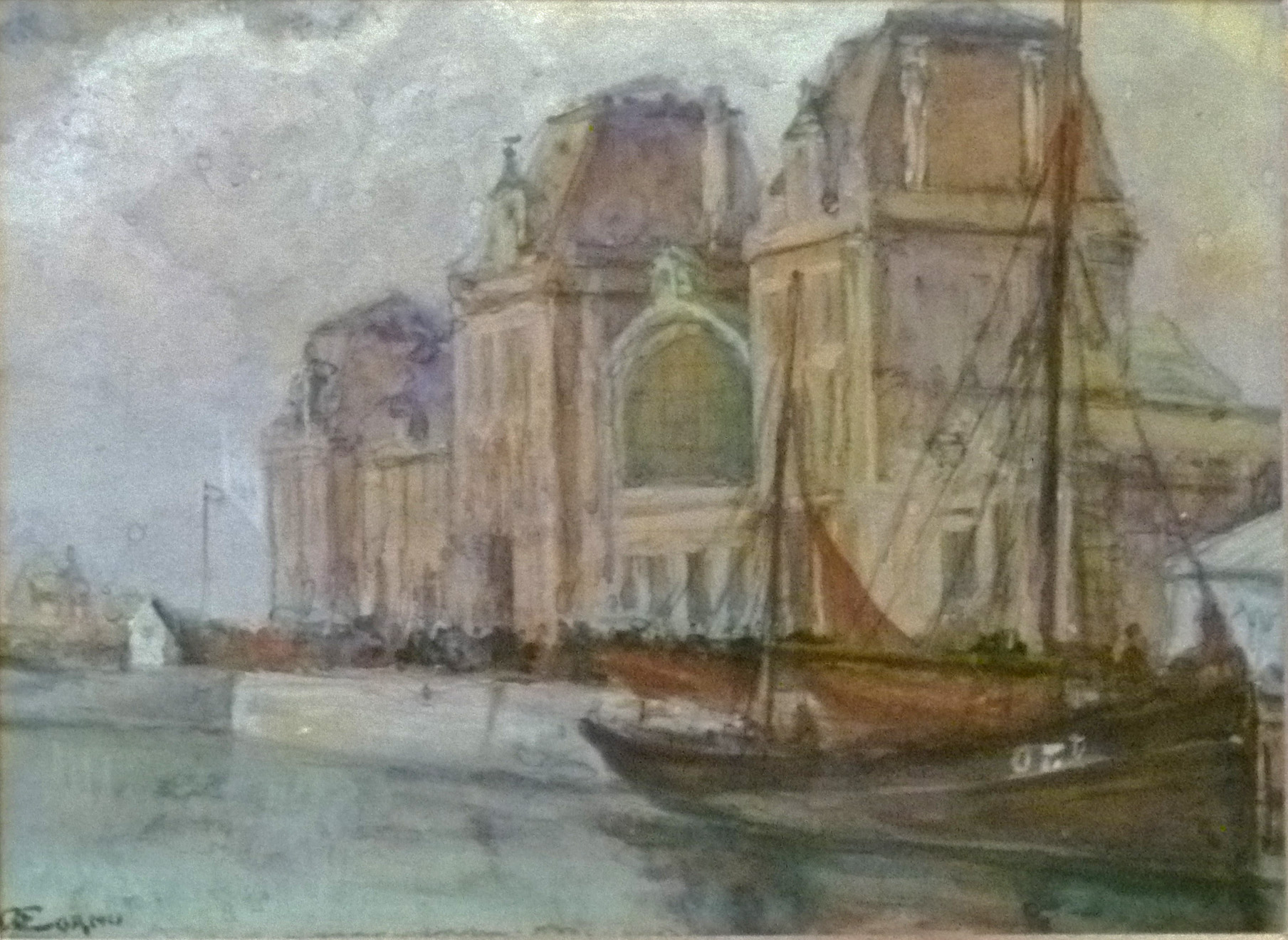 "Station van Oostende en vissersboot", aquarel (24 x 36 cm) door de Belgische kunstschilder Oscar Cornu (1866-1939); privébezit